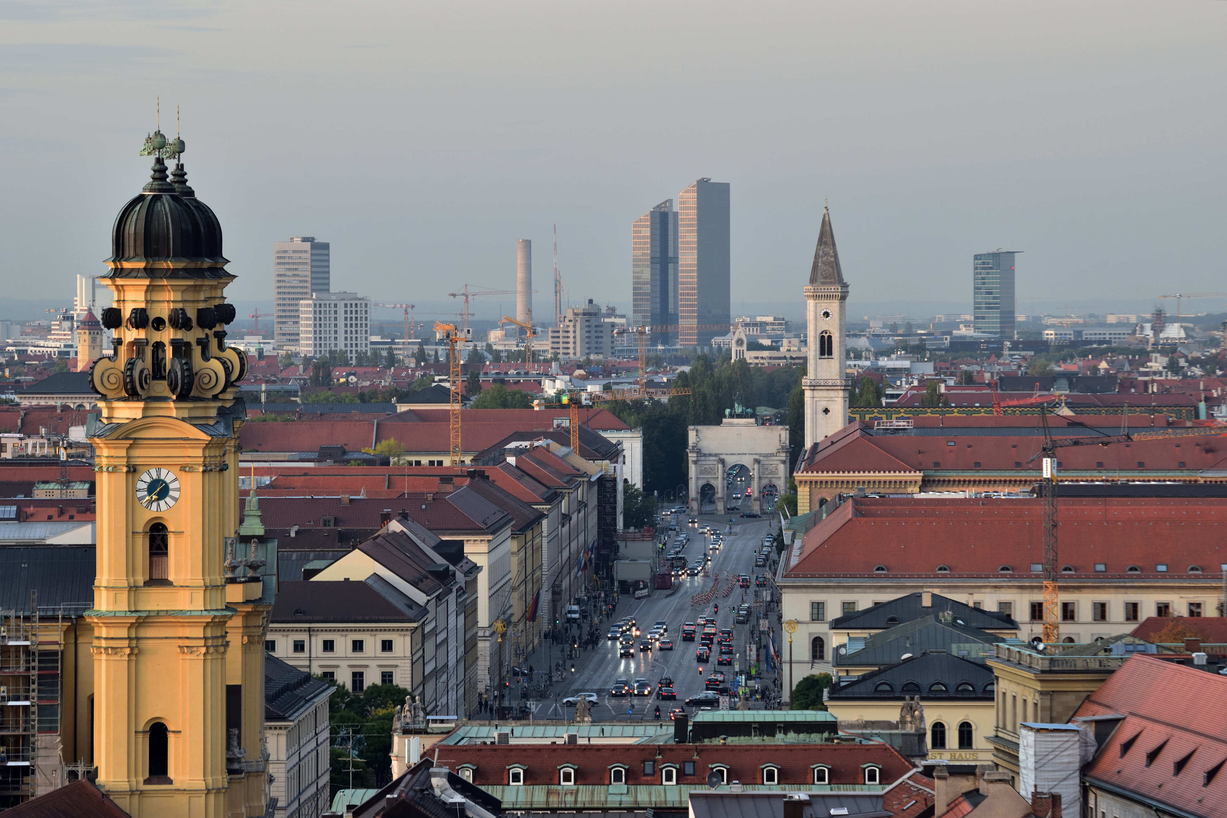 München - Blick vom Neuen Rathausturm zu Ludwigstraße und Siegestor. Vorne links Türme der Theatinerkirche - September 2017This is a photograph of an architectural monument.